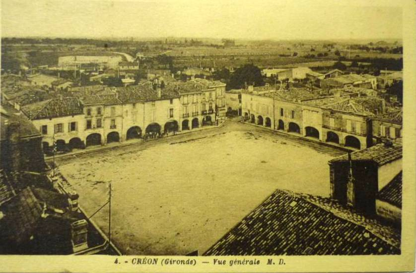 Creon